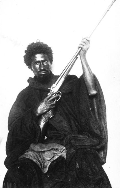 Mauritanie, Hassan qui guida Cappolani [sic] en pays Duarza